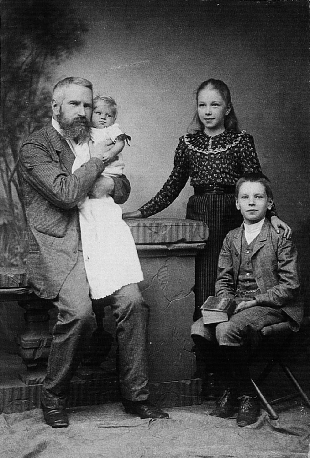 Hoffotograf Wilhelm Kuntzemüller mit seinen drei Kindern im Atelier, Fotografie, 18X12 cm, Privatbesitz